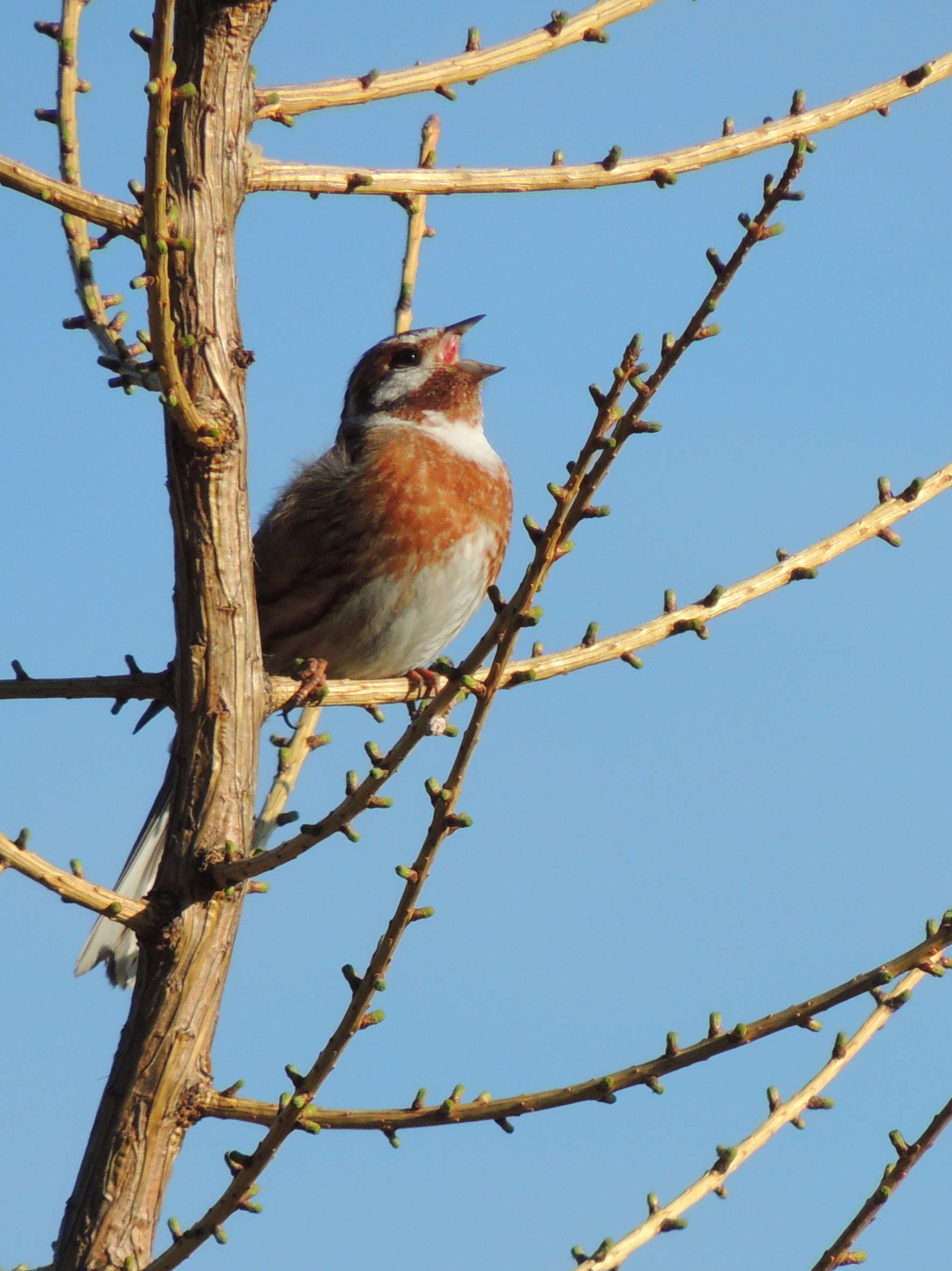 Белошапочная овсянка